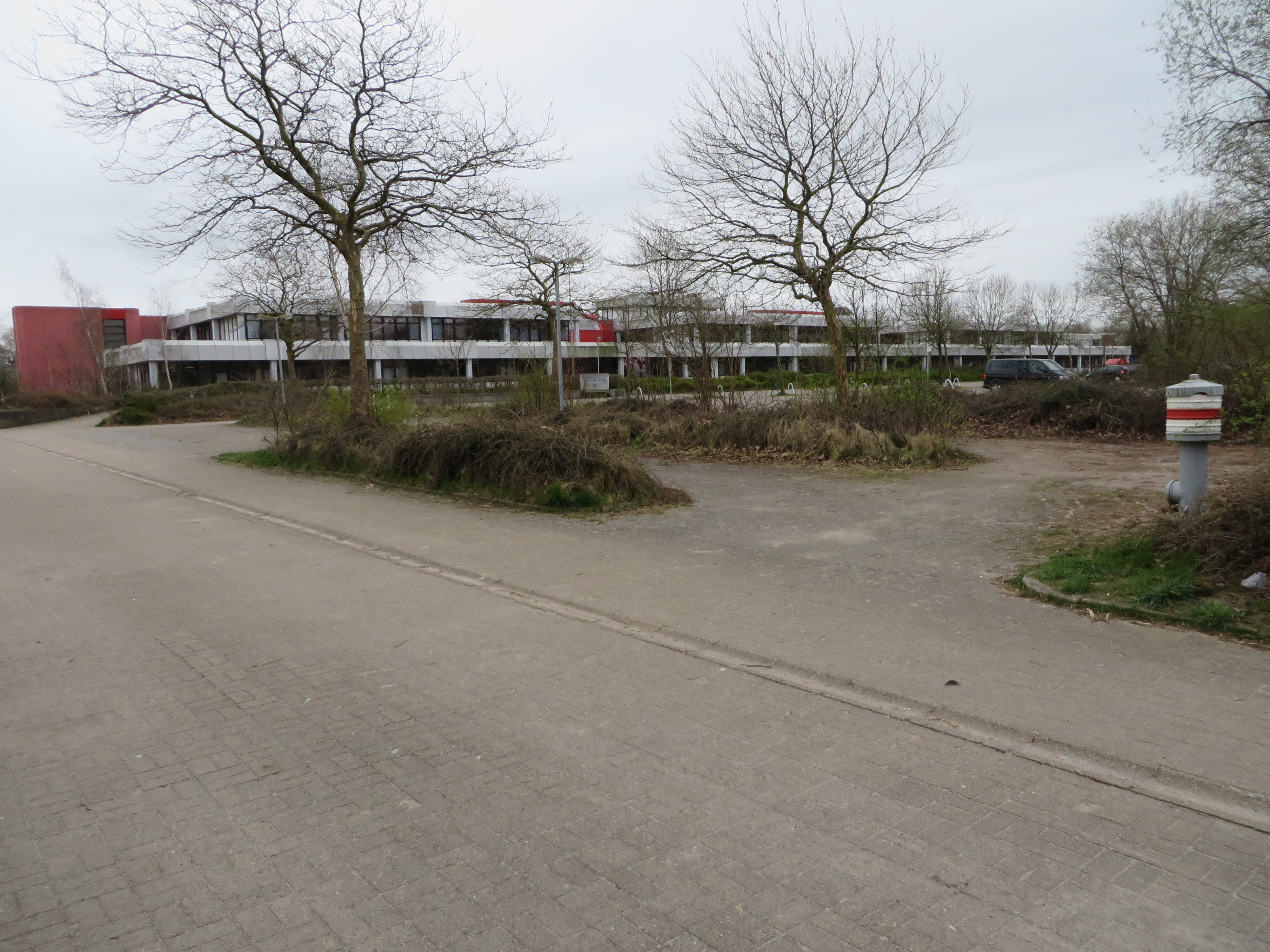 Fördegymnasium Flensburg (April 2014), Bild 01